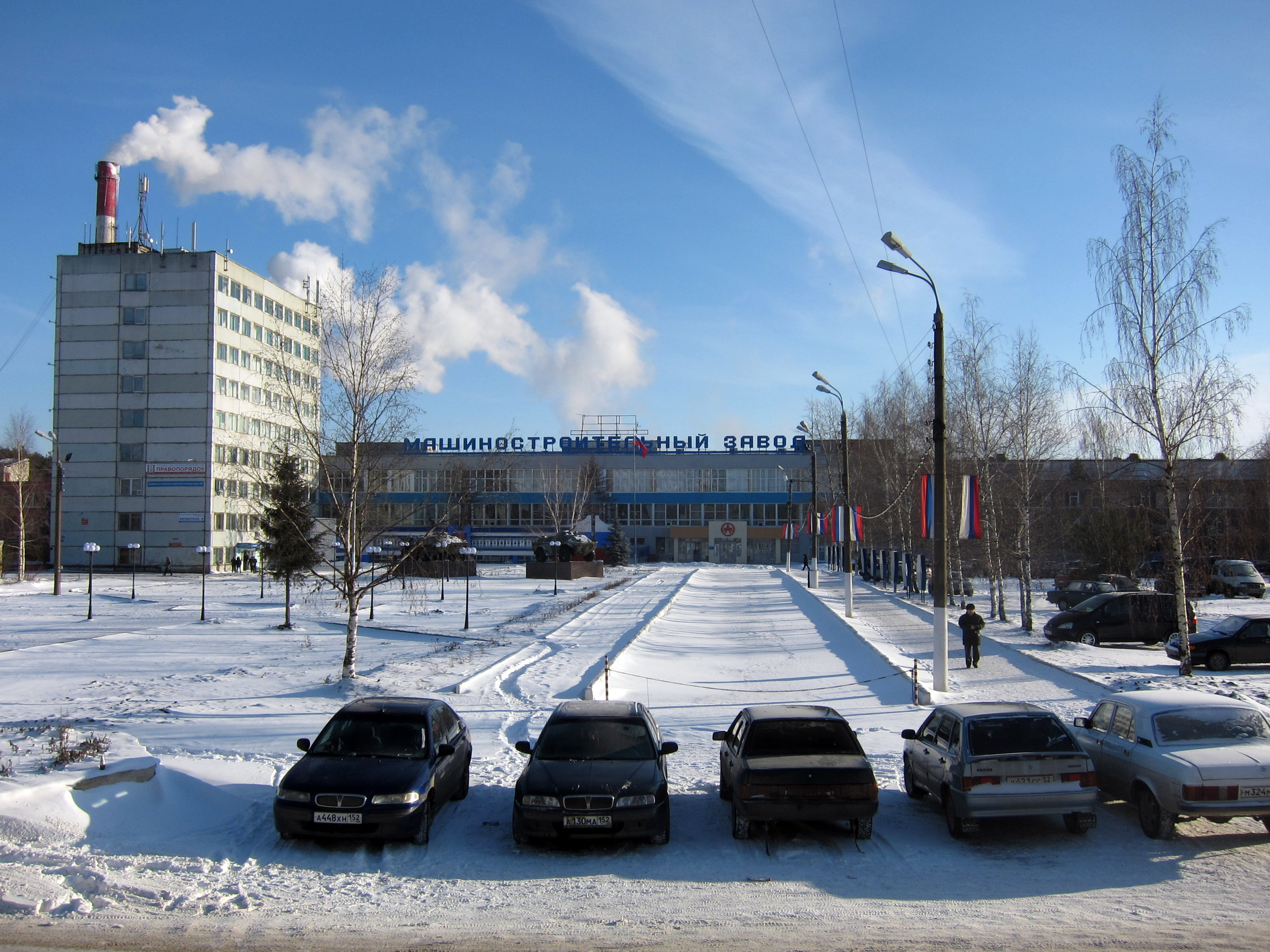 Arzamas machine-building (AMZ)